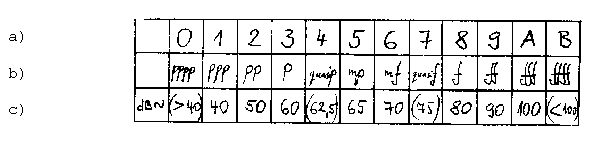 Rida helitugevuse parameetris: a) rea elemendi number, b) muusikaliste helitugevuste rida, mida on kasutanud Boulez oma teoses Structures I (Ligeti 1958:41); , c) umbkaudne helitugevus detsibellides (Burghauser, Špelda 1971:82)